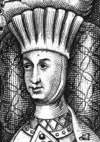 Tombeau de Mathilde de Flandre, Duchesse de Brabant